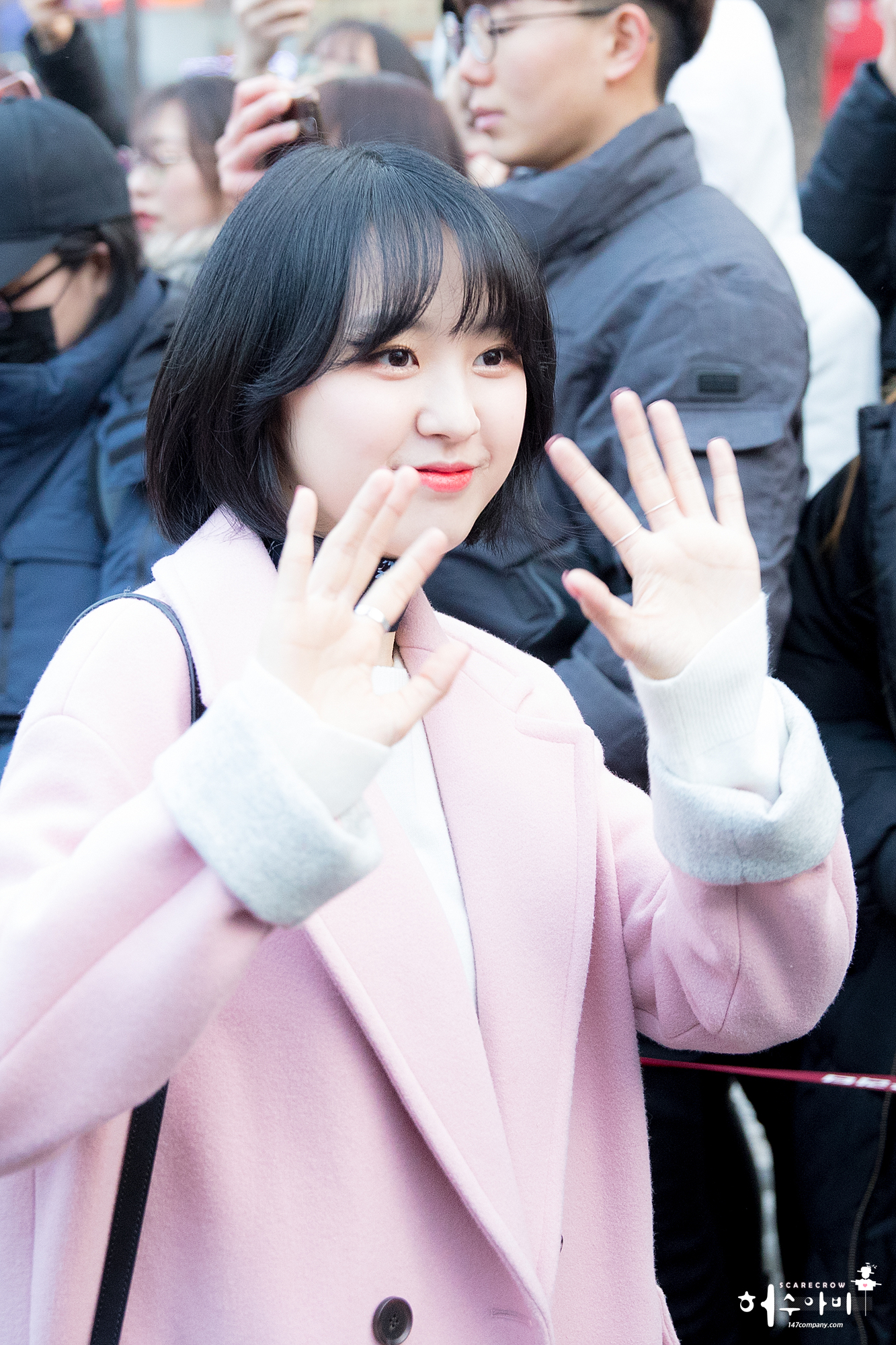 [18.02.23] 뮤직뱅크 직찍 ( 더유닛 UnitG 우희 앤씨아 이수지 지엔 의진 달샤벳 라붐 소나무 )